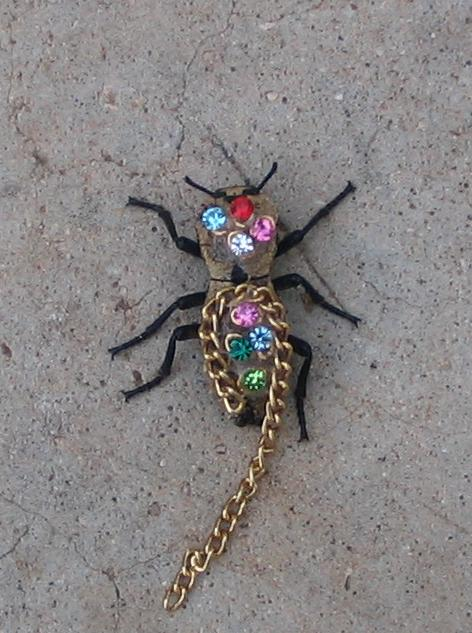 Maquech joya viviente